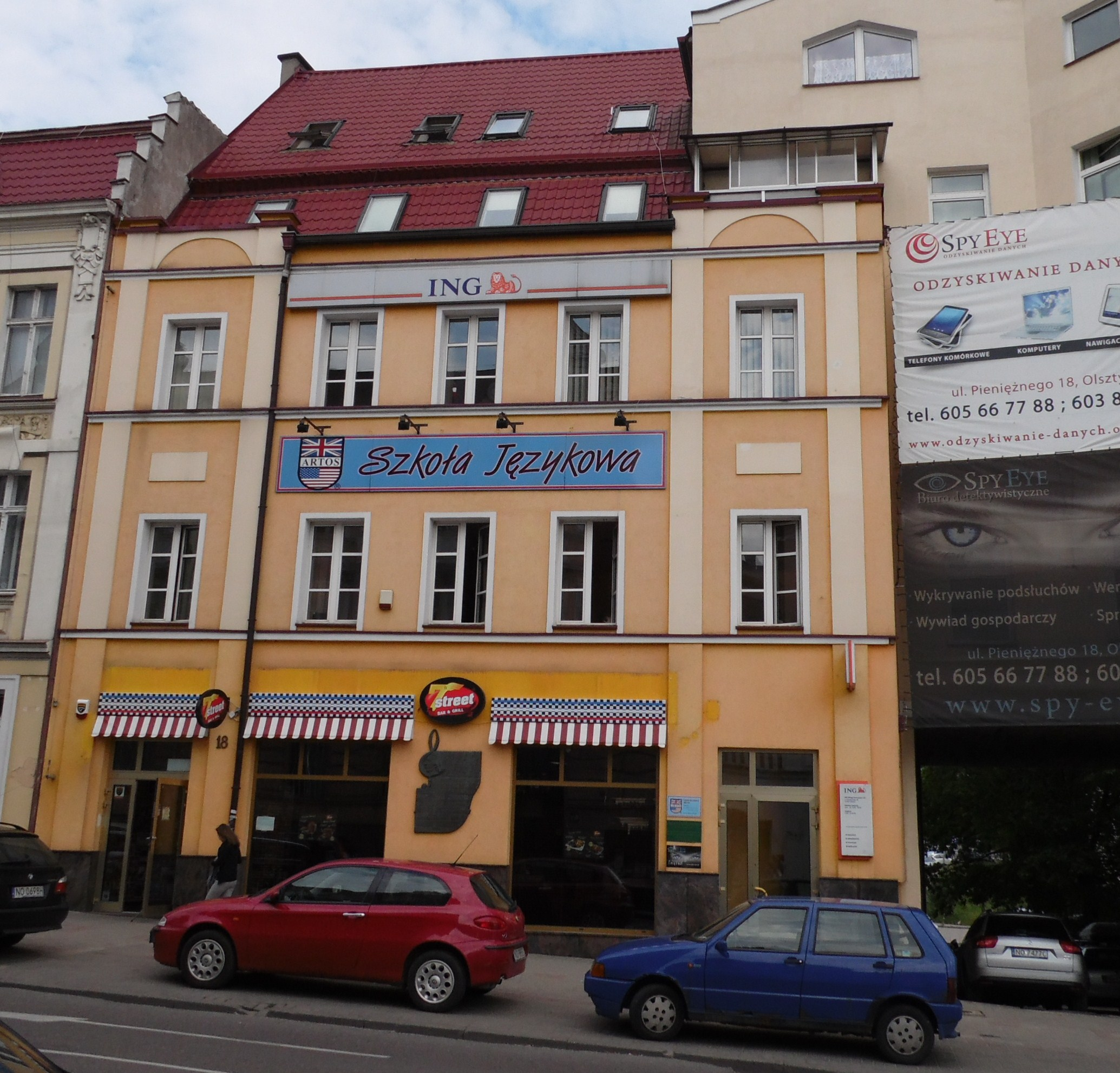 SZKOŁA JĘZYKOWA.